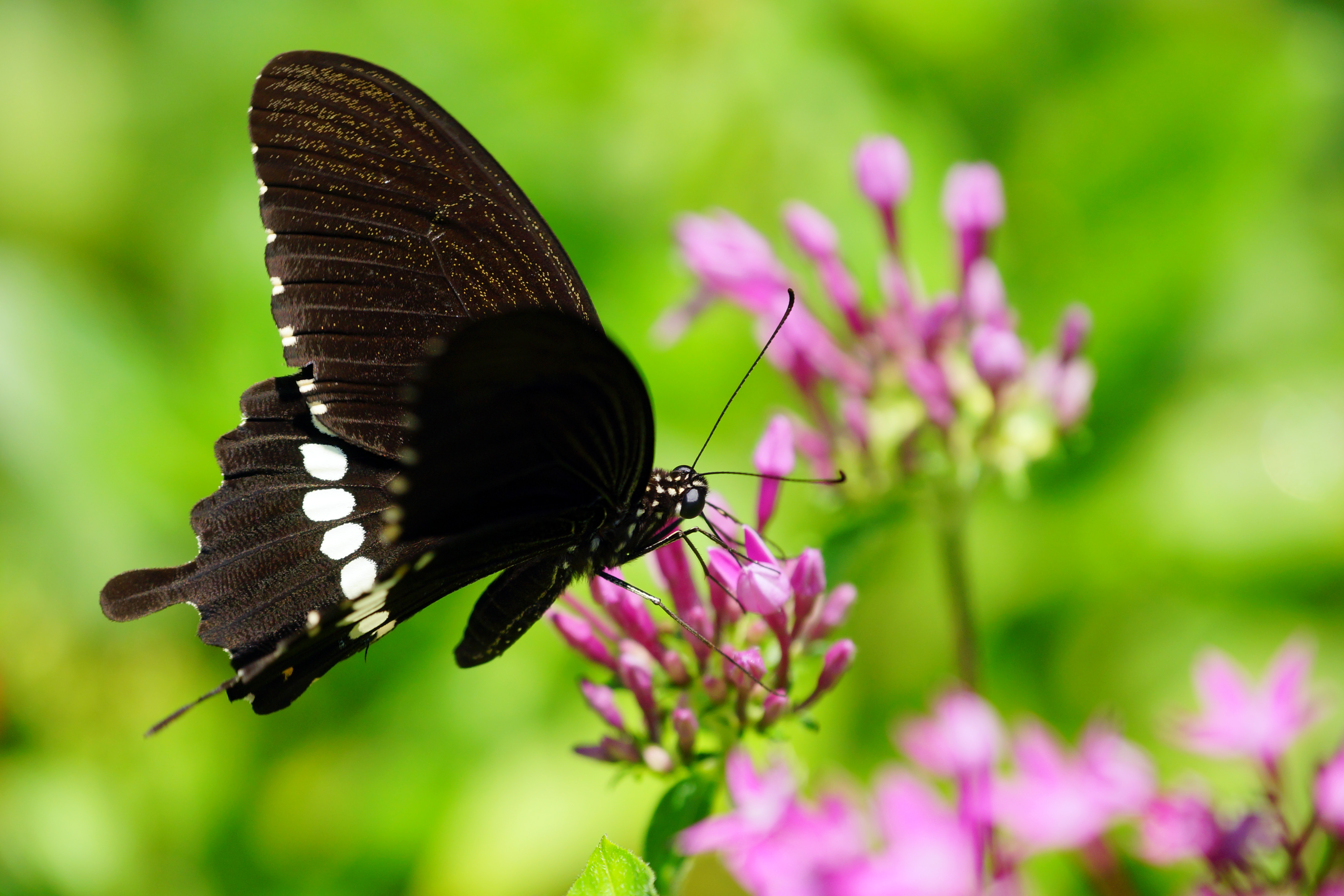 玉帶鳳蝶 Papilio polytes polytes